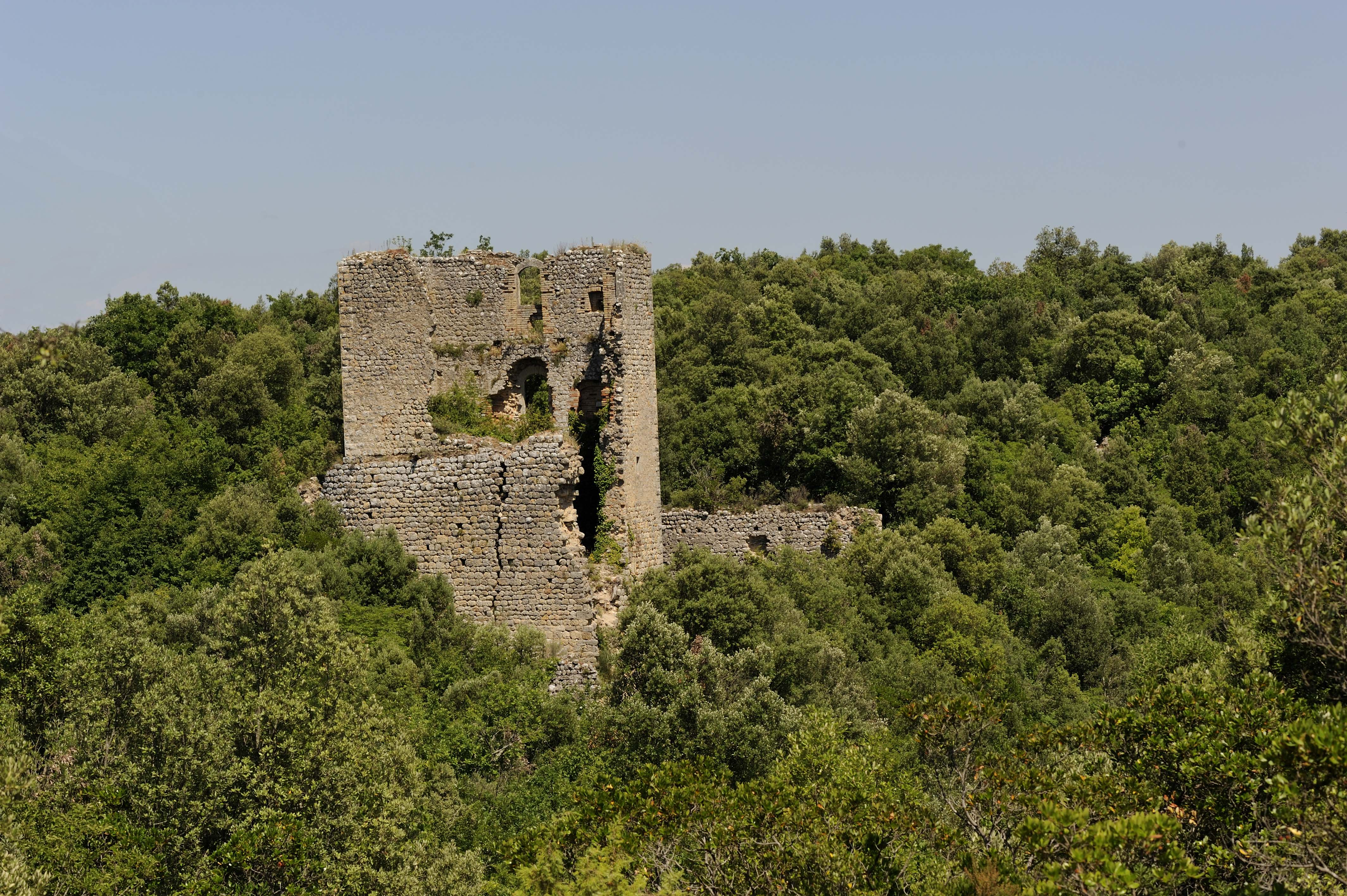 Mastio del castello di Castelvecchio di San Gimignano - Siena